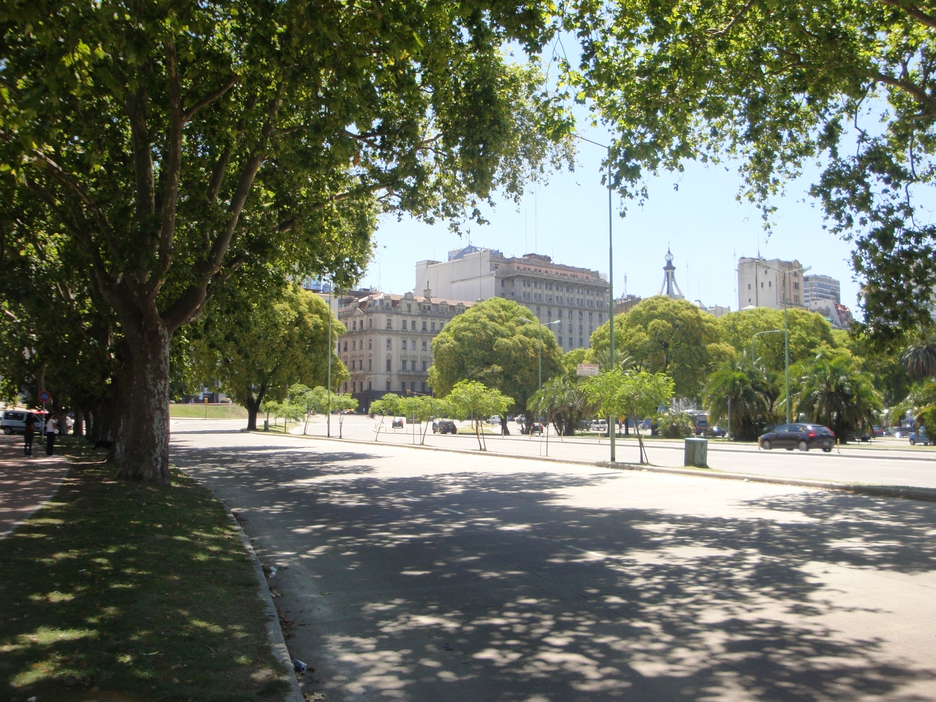 Avenida La Rábida Norte, Buenos Aires, Argentina.